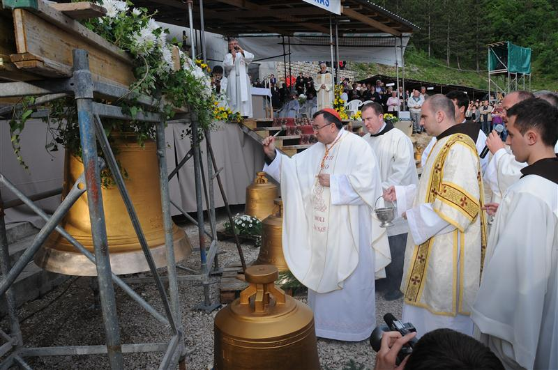 Biskup Vinko Puljić na blagoslovu crkve sv. Ive u Podmilačju